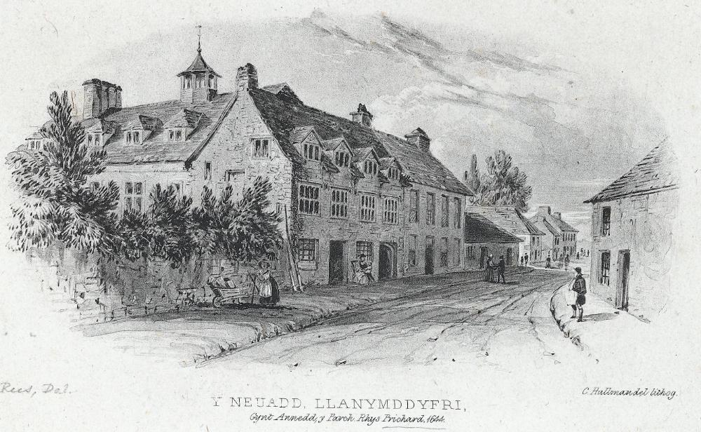 Y Neuadd, Llanymddyfri, Gynt Annedd y Parch. Rhys Prichard, 1644